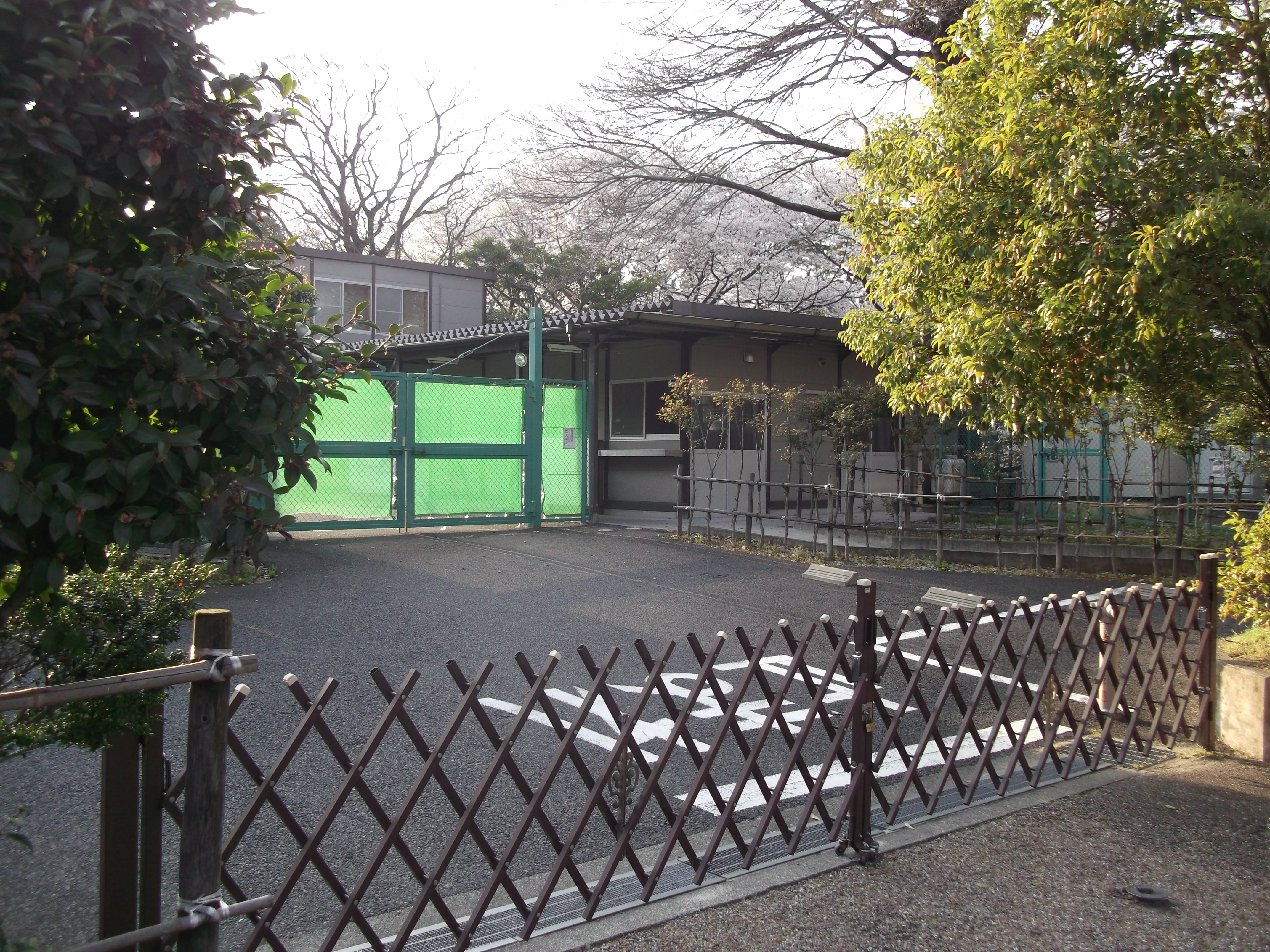 名古屋市中区三の丸にあった名城公園宿泊所を東側公道より写す。